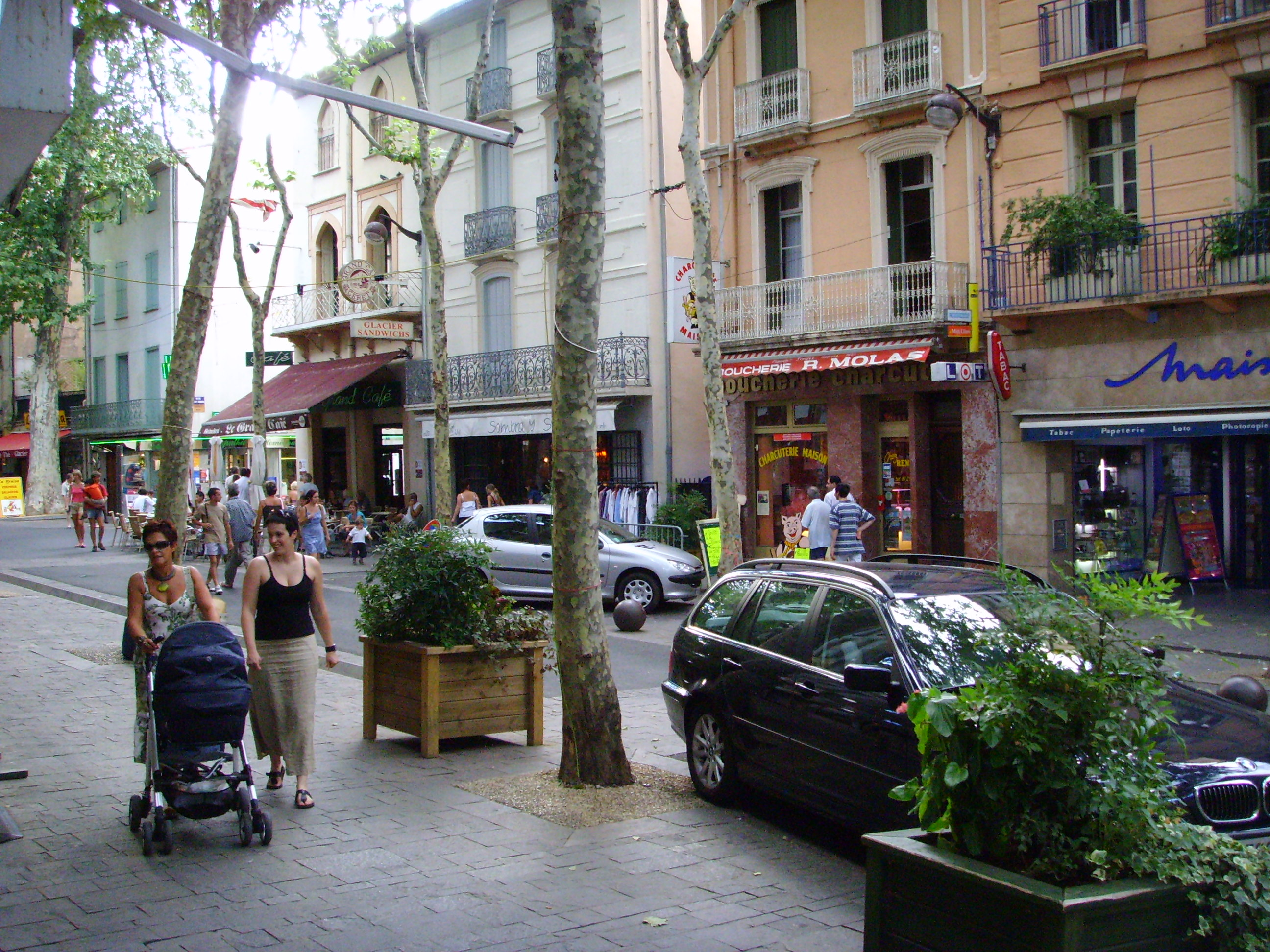 Céret, France. Boulevard du Maréchal Joffre main street near "Le Grand Café". Author: Gerbil, summer 2006.